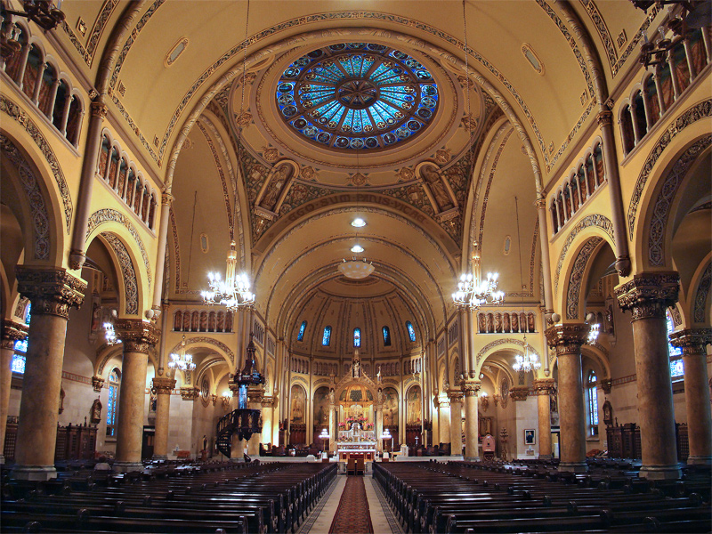 Église Saint-Stanislas-De-Kostka, Montréal, Québec, Canada.